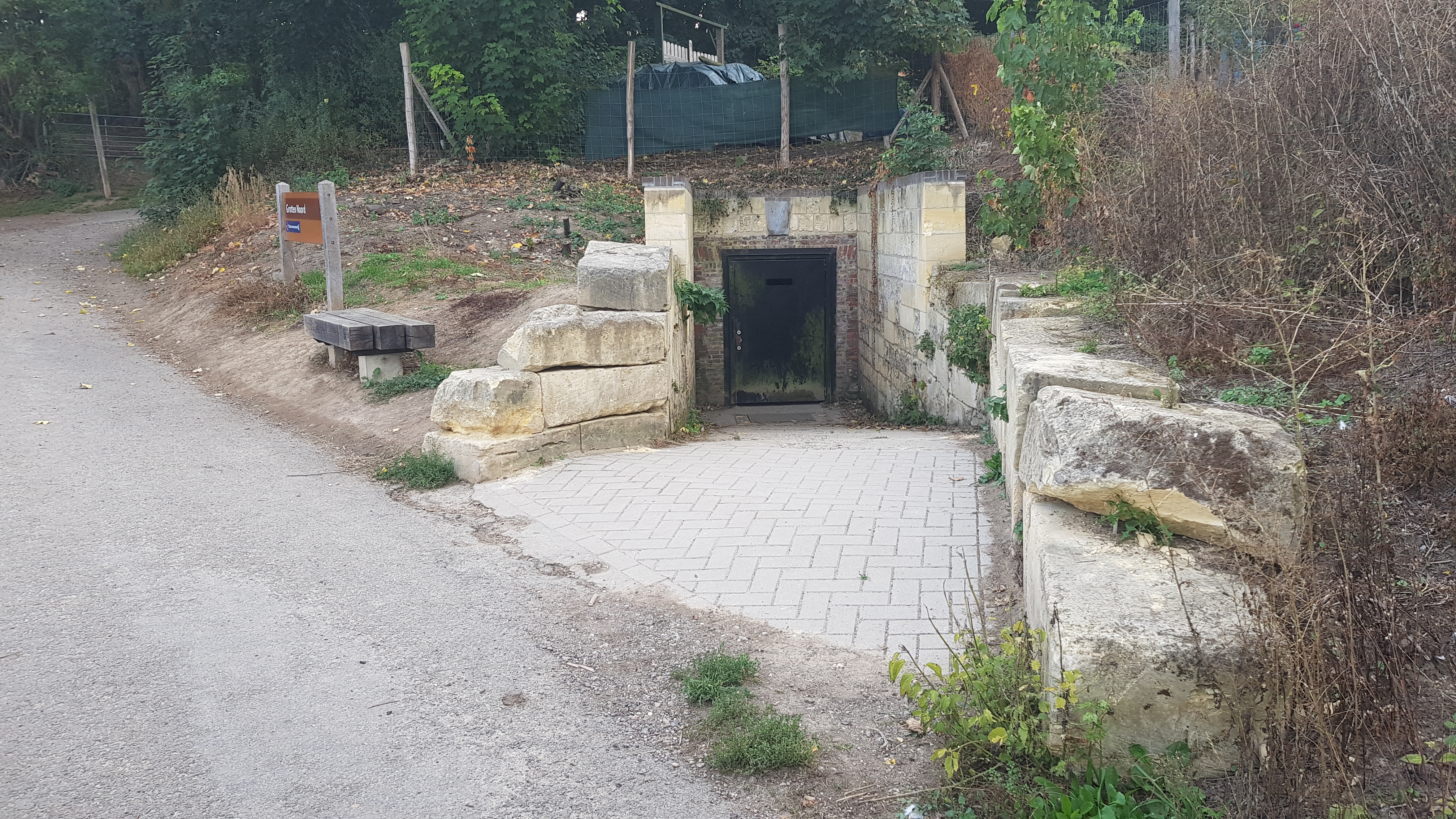 ingang gangenstelsel Ceulen van het Noordelijk Gangenstelsel, Sint-Pietersberg, Maastricht, Nederland